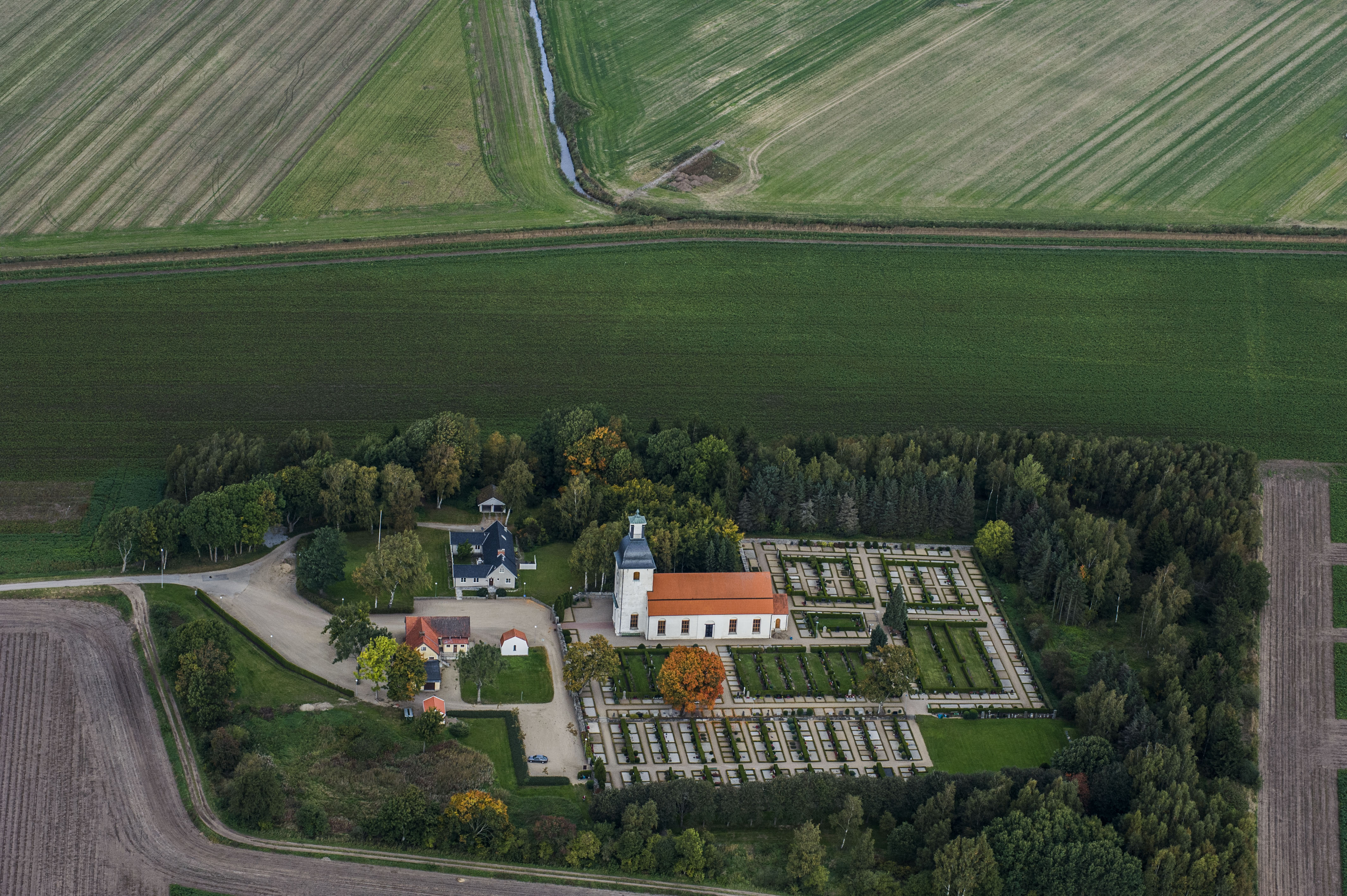 Gammalstorps kyrka från luften